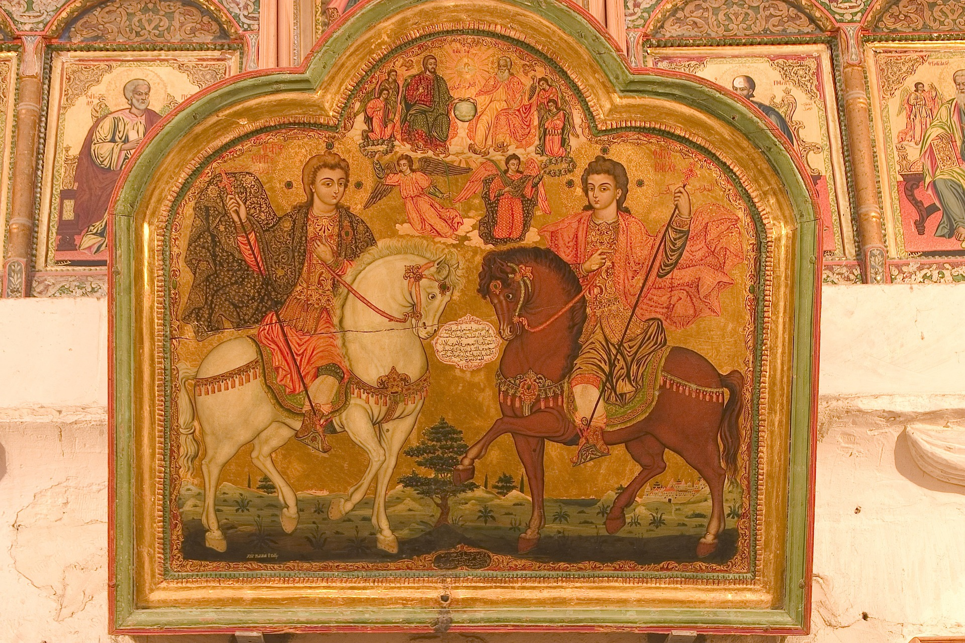 أيقونة القديسين سرجيوس وباخوس في صيدنايا - سوريا